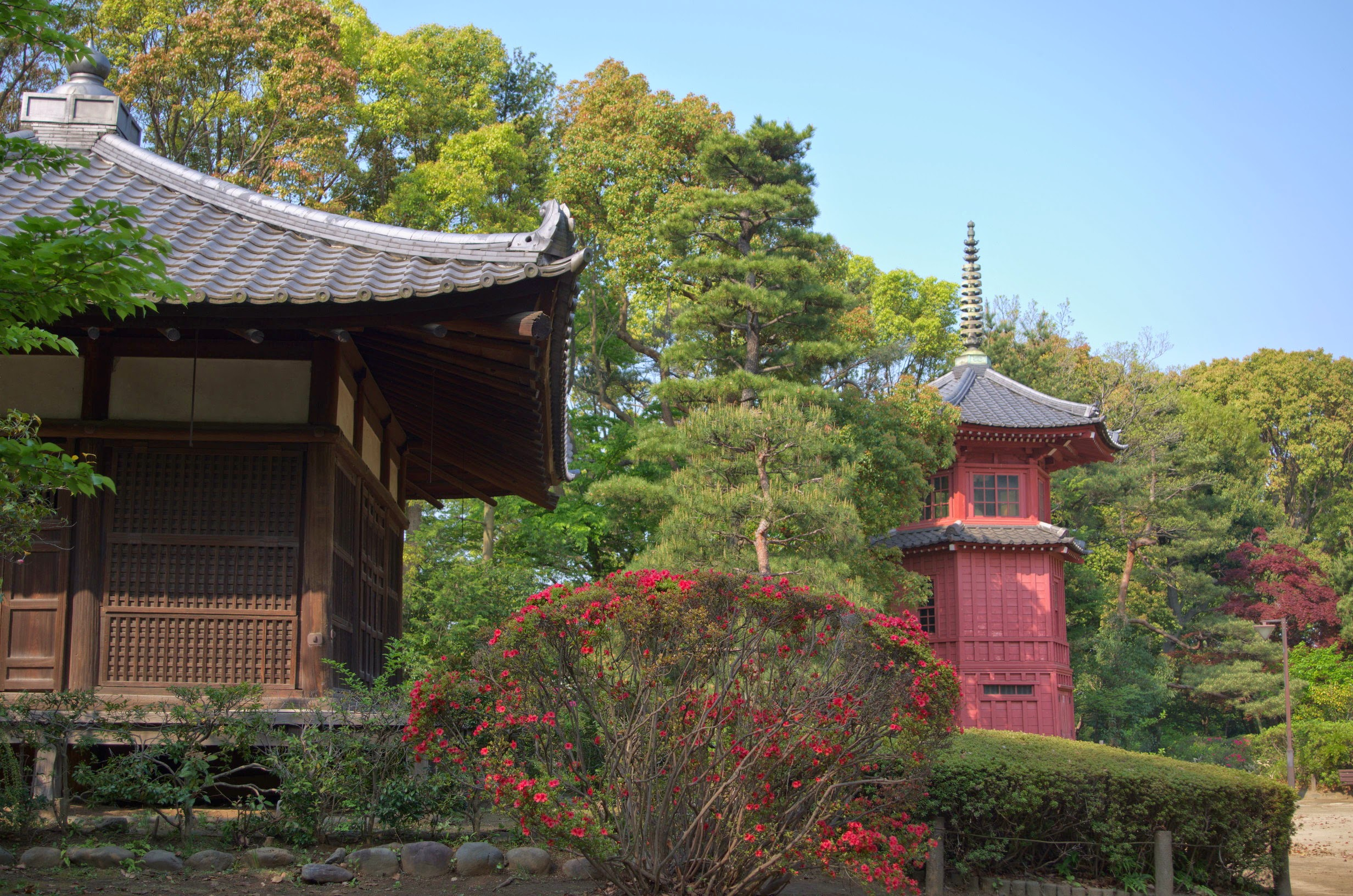 Tetsugakudo Park(Philosophy Hall Park) / 哲学堂公園